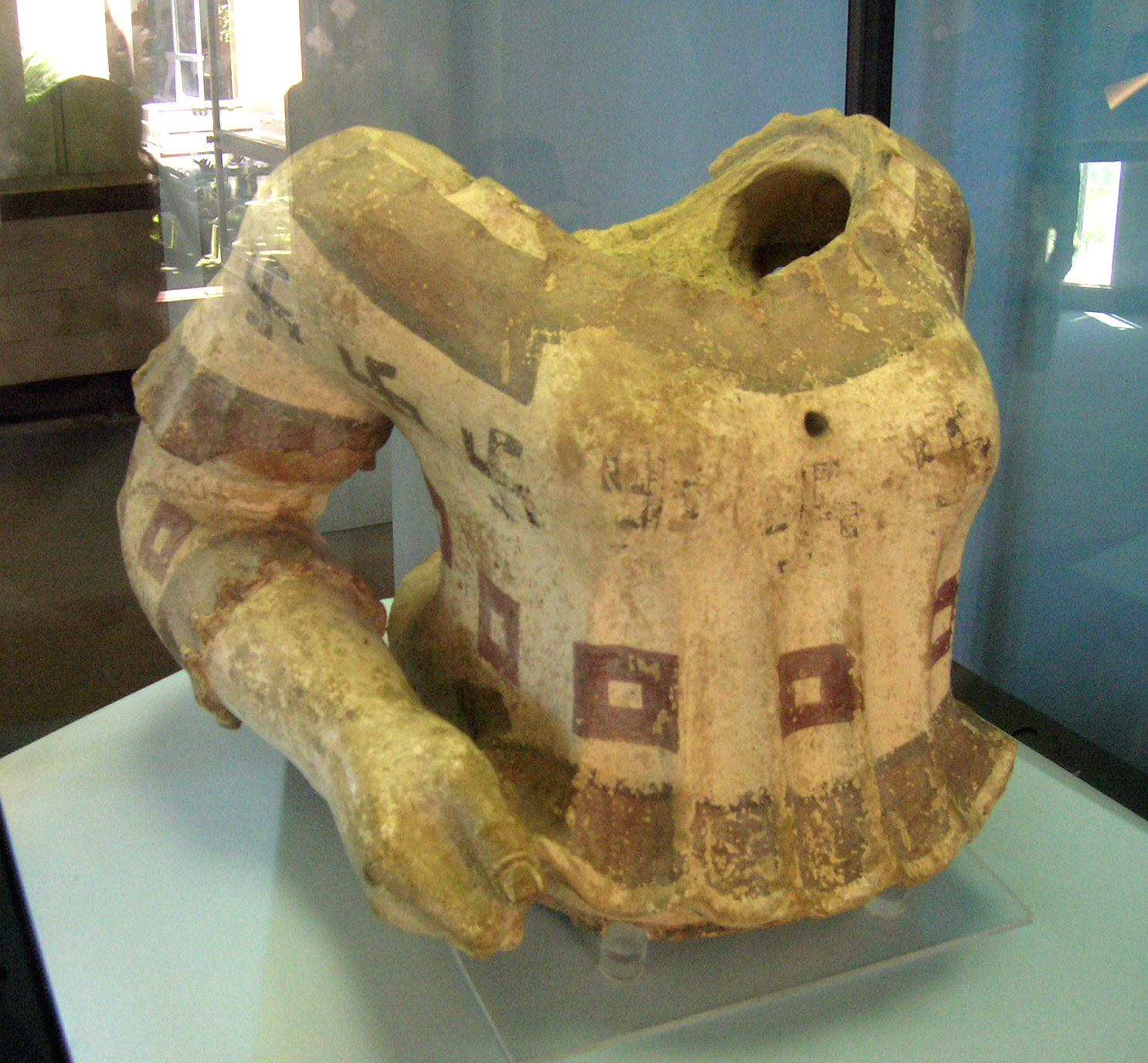 Museo Archeologico Nazionale di Paestum - MIBAC This is a photo of a monument which is part of cultural heritage of Italy.